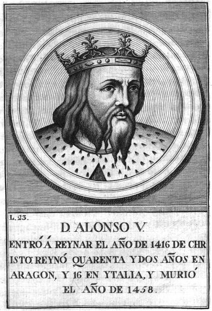 Retrato de 'Alfonso V, vigésimo tercero rey de Aragón, ilustración del libro Retratos de los reyes de España, desde Atanarico hasta ... D. Carlos III (1788).